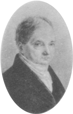 Porträt von Damian von Mosthaf.